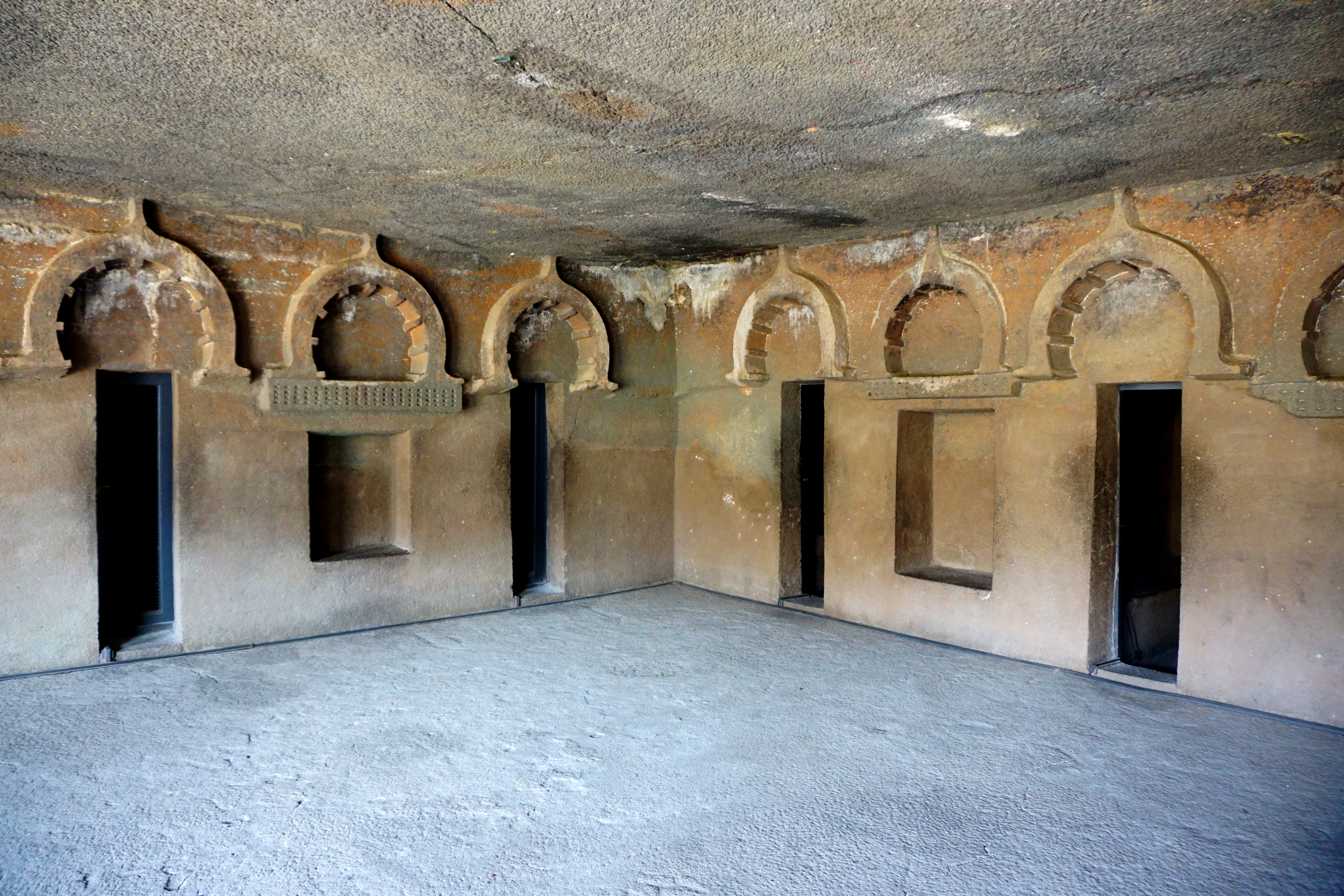 Ajanta Caves, Aurangabad, India